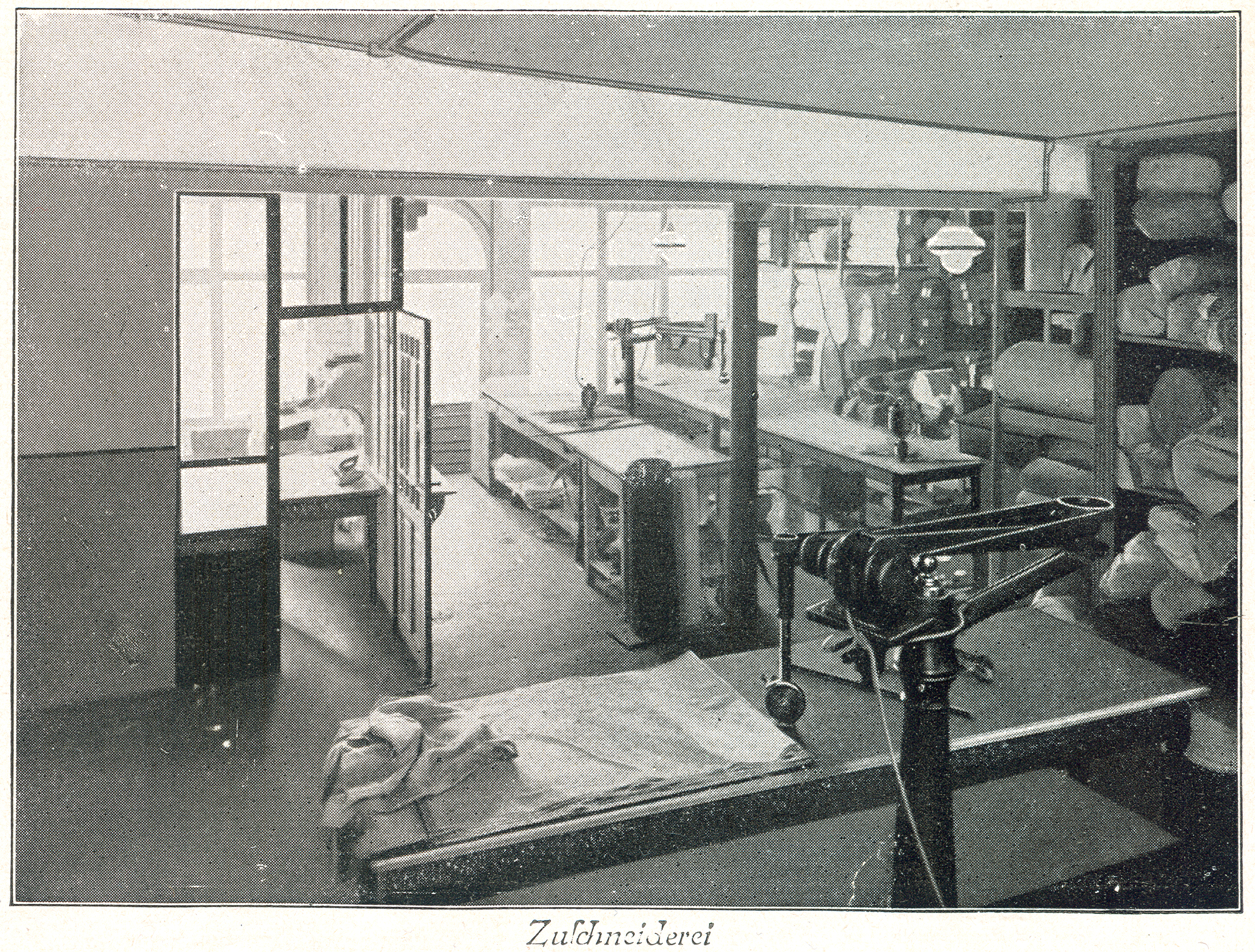 Blick in die Zuschneiderei des Unternehmens Julius Buchholz, Berufswäschefabrik, zugleich "Erstes Versandhaus für Fleischerei-Bedarfsartikel", damalige Adresse: Osterstraße 13-15 in Hannover ...